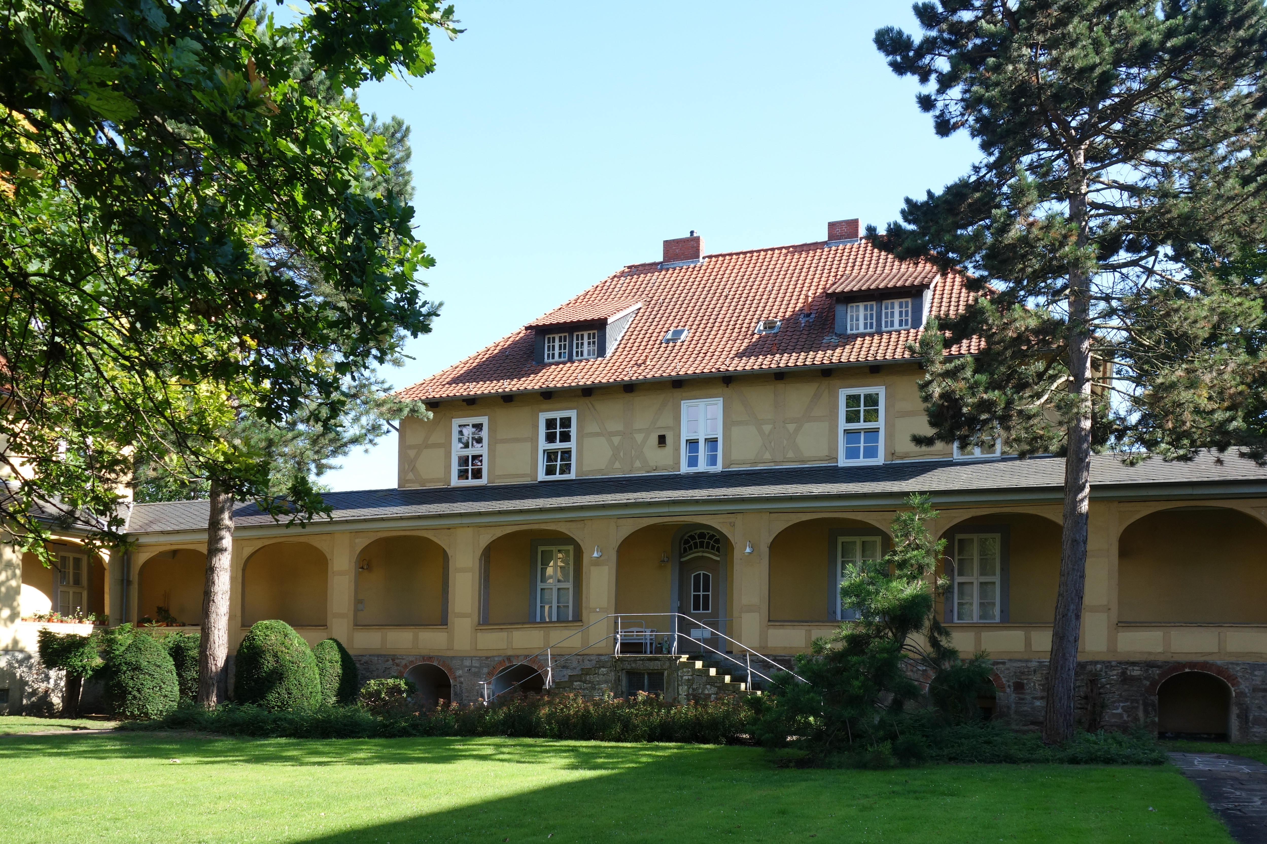 Stift Steterburg - Wohnhaus der Äbtissin, errichtet 1691